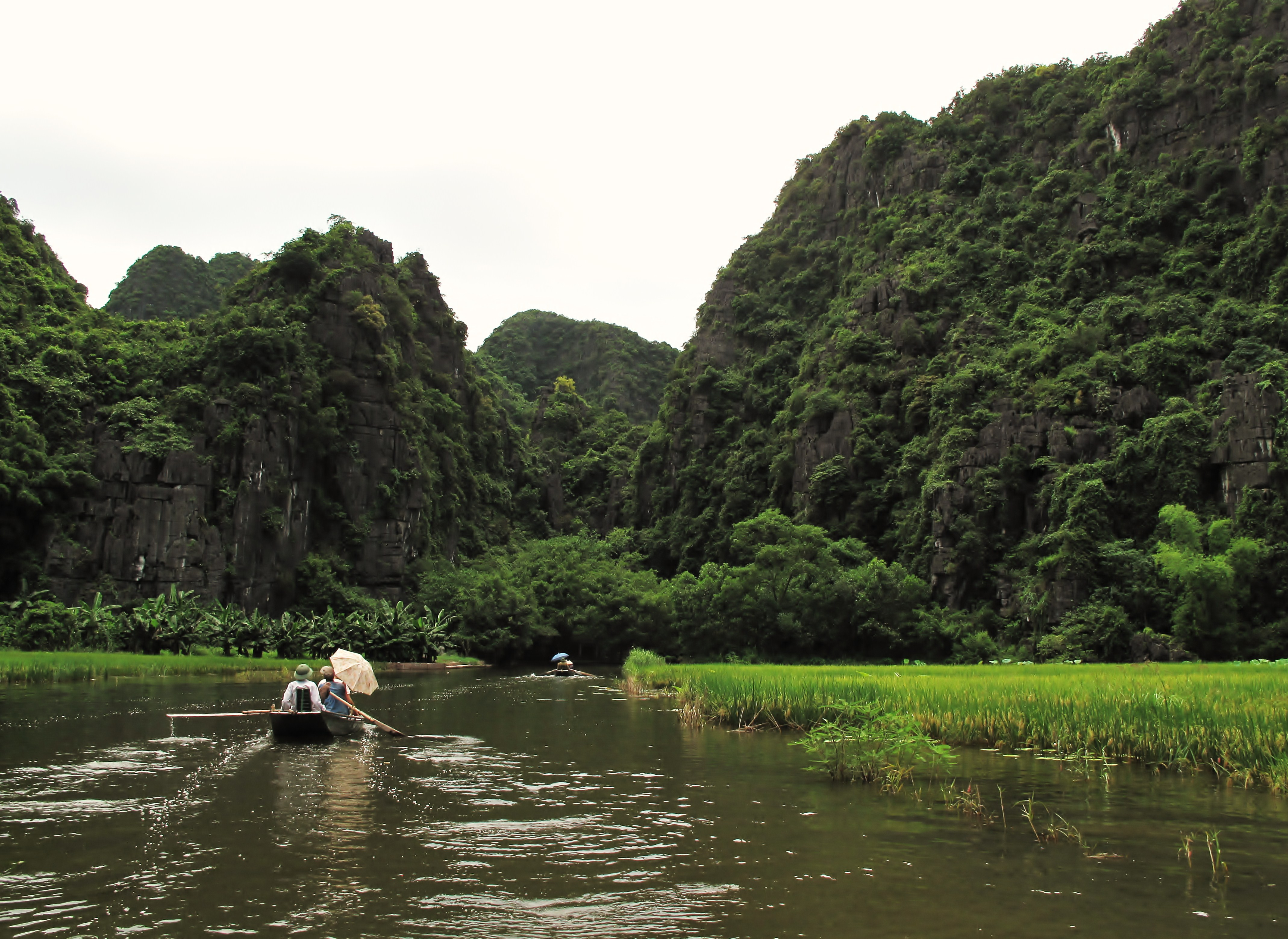 Ninh Binh on a boat